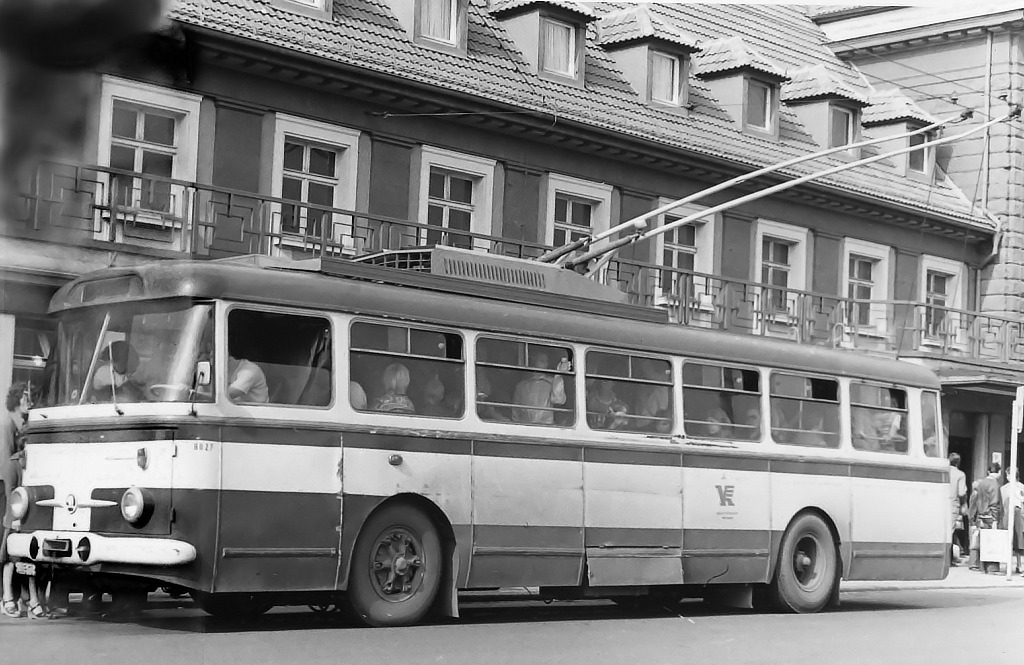 O-Bus Škoda 9Tr Nr. 8027 auf der Linie 1 am Hauptbahnhof Weimar im Juni 1978